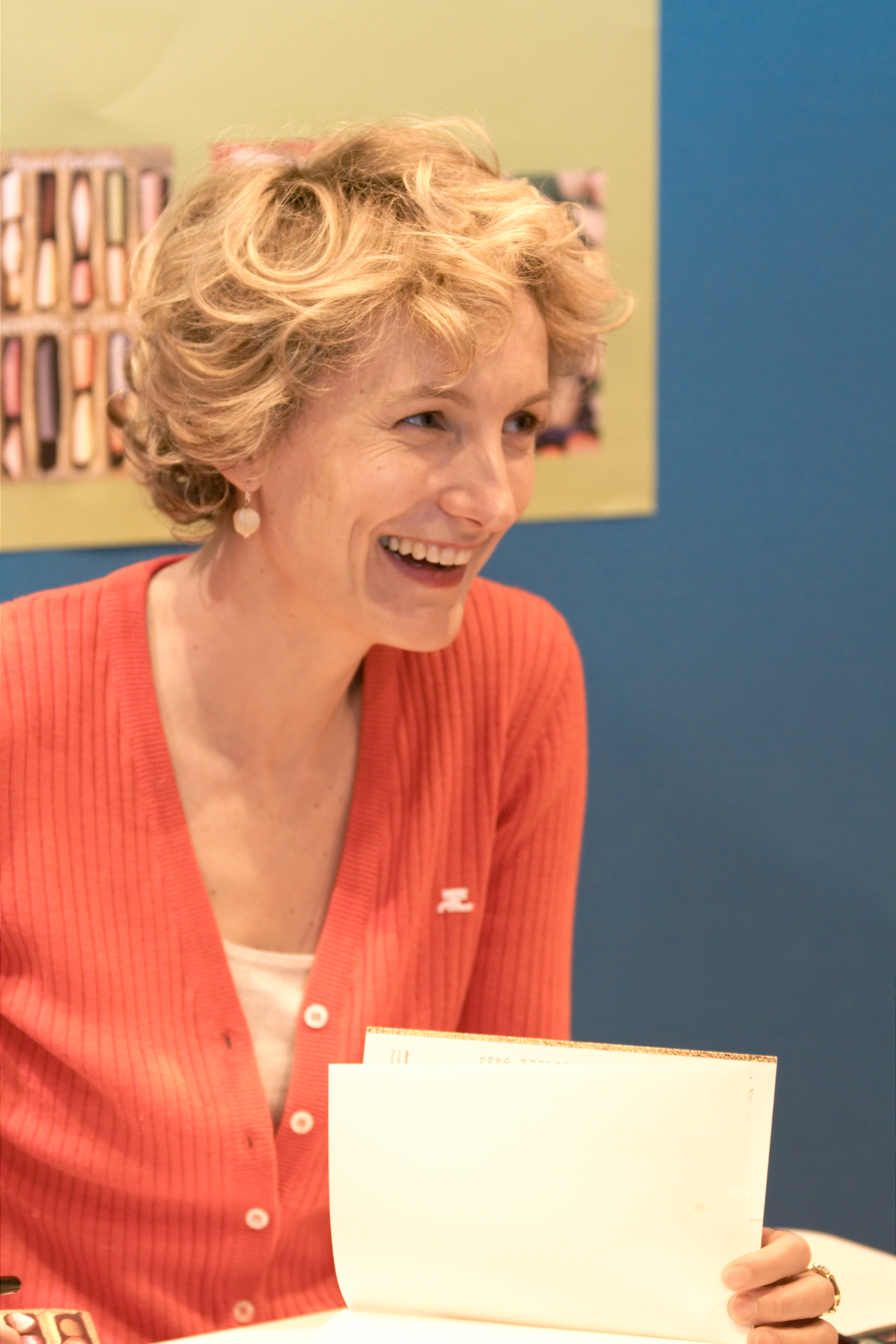 Anna Gavalda en dédicace au Salon du livre de Paris.